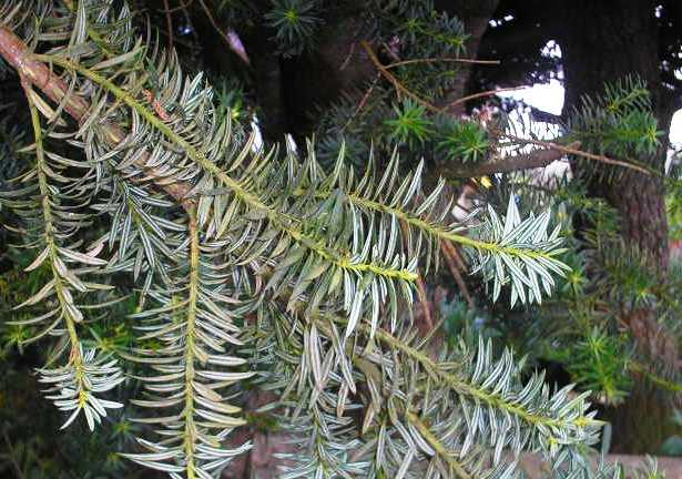 Rama de mañío de hojas punzantes {Podocarpus nubigenus Mapudungun: Mañiw ñi tapül